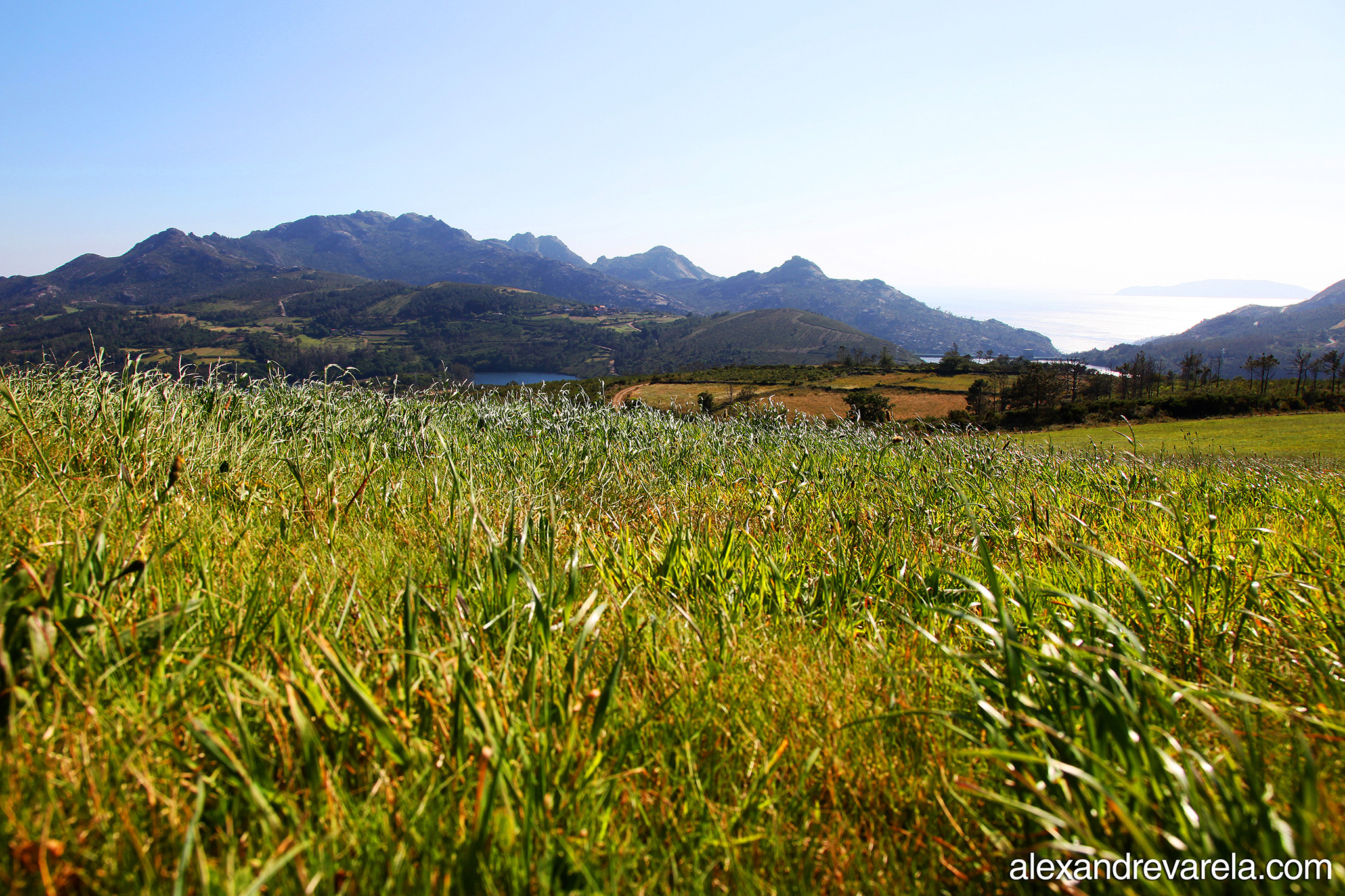 Monte Pindo. Foto - Alexandre Varela